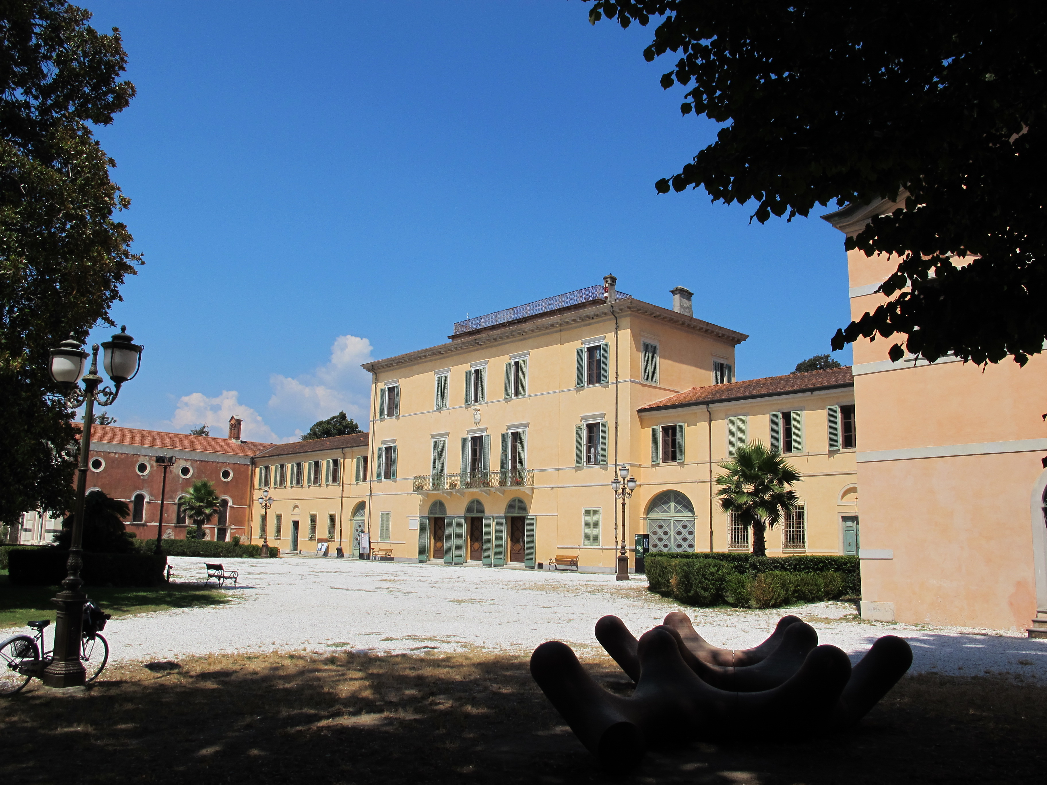 Viareggio, villa borbone, ext.